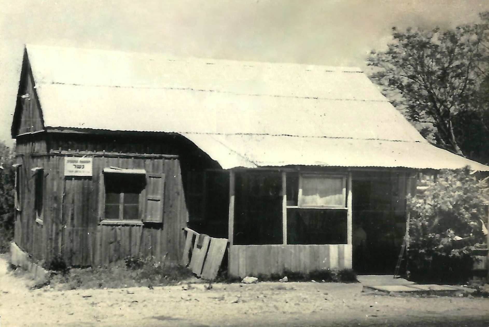 צריף ועד הקהילה של שכונת נשר. בהמשך שימש כצריף המועצה המקומית נשר שכן במקום בו נמצא היום הרמזור בצומת שבין דרך בר יהודה דרך השלום ורחוב הכלניות תחילת הכביש העולה לעוספיה מול בניין הדואר הישן במרכז שכונת נשר הוותיקה